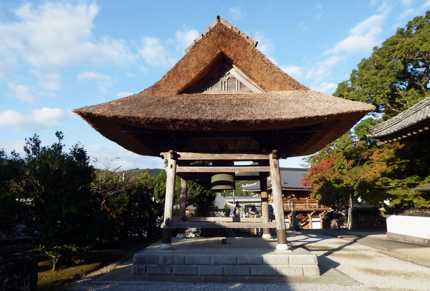 仏木寺の茅葺鐘楼